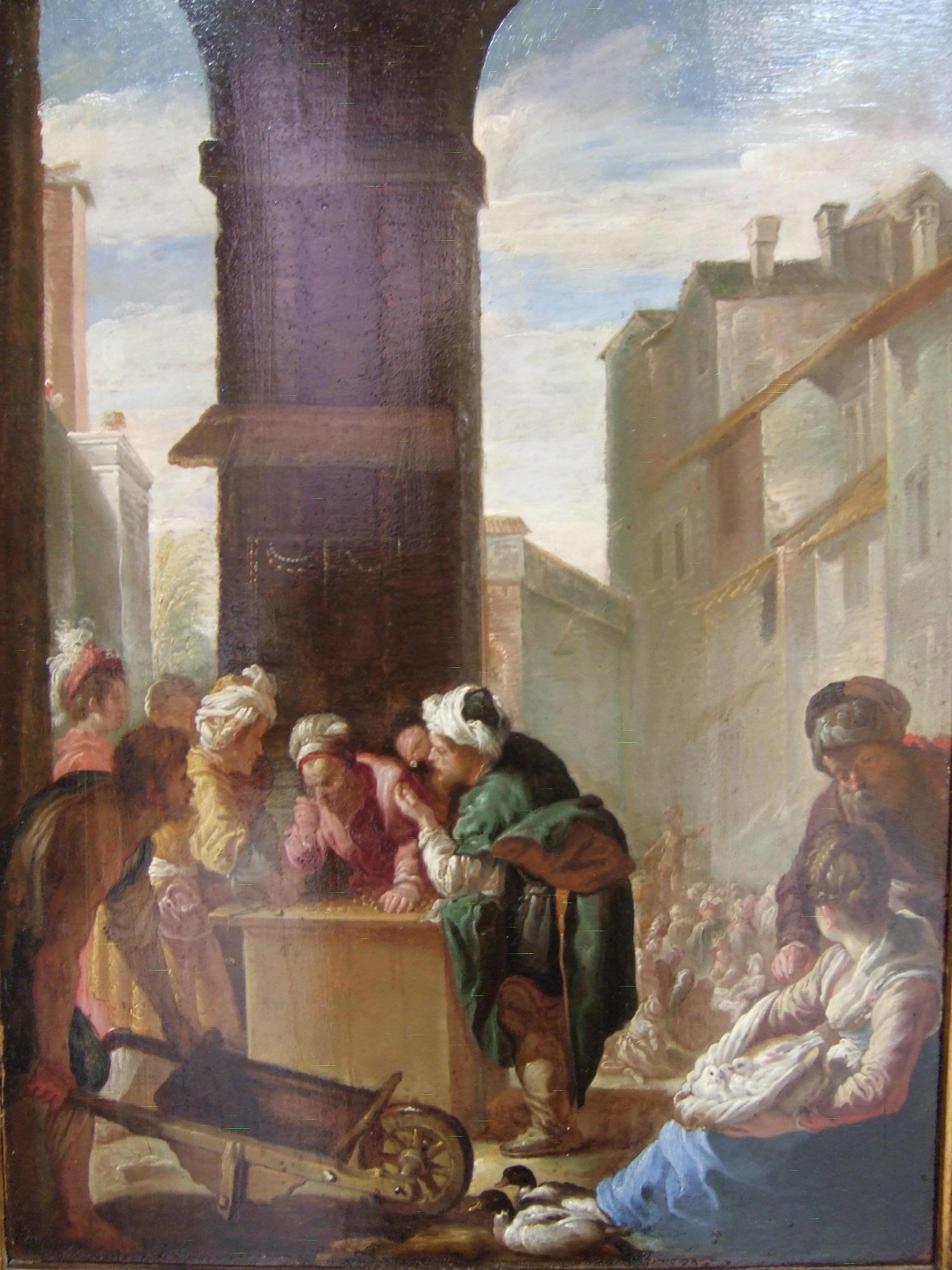 Domenico Fetti La Perle de grand prix Musée des Beaux-Arts de Caen